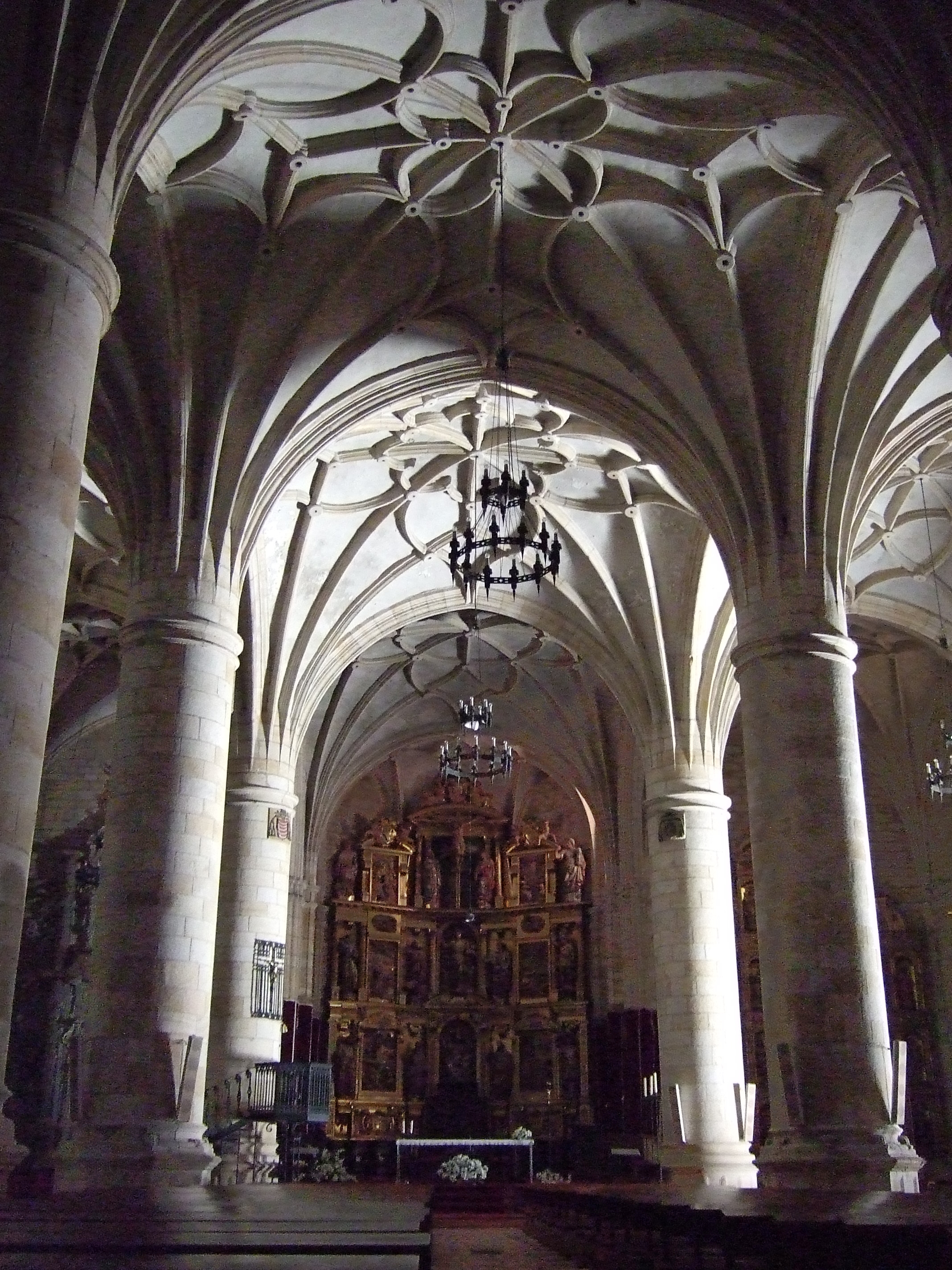 Concatedral de San Pedro de Soria - Interior